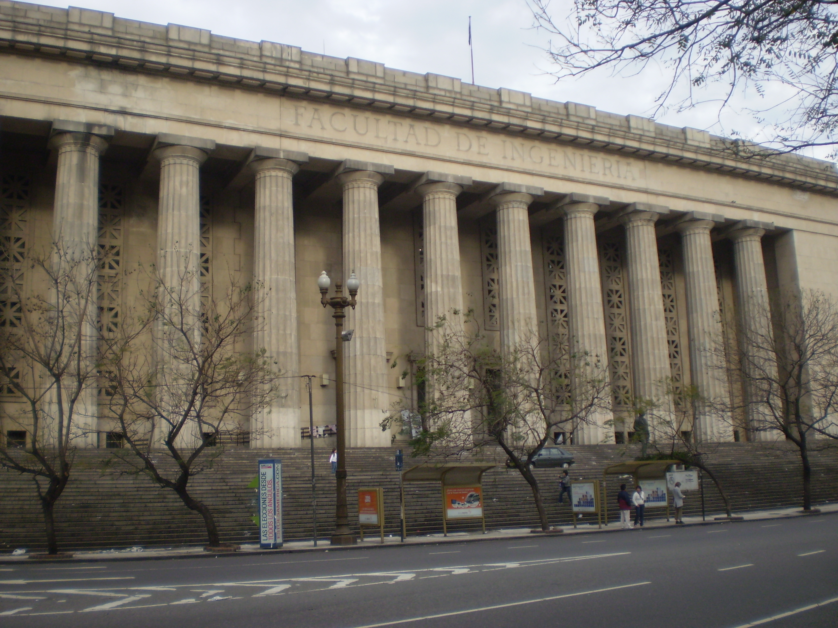 Facultad de Ingeniería de la Universidad de Buenos Aires, frente de la avenida Paseo Colón